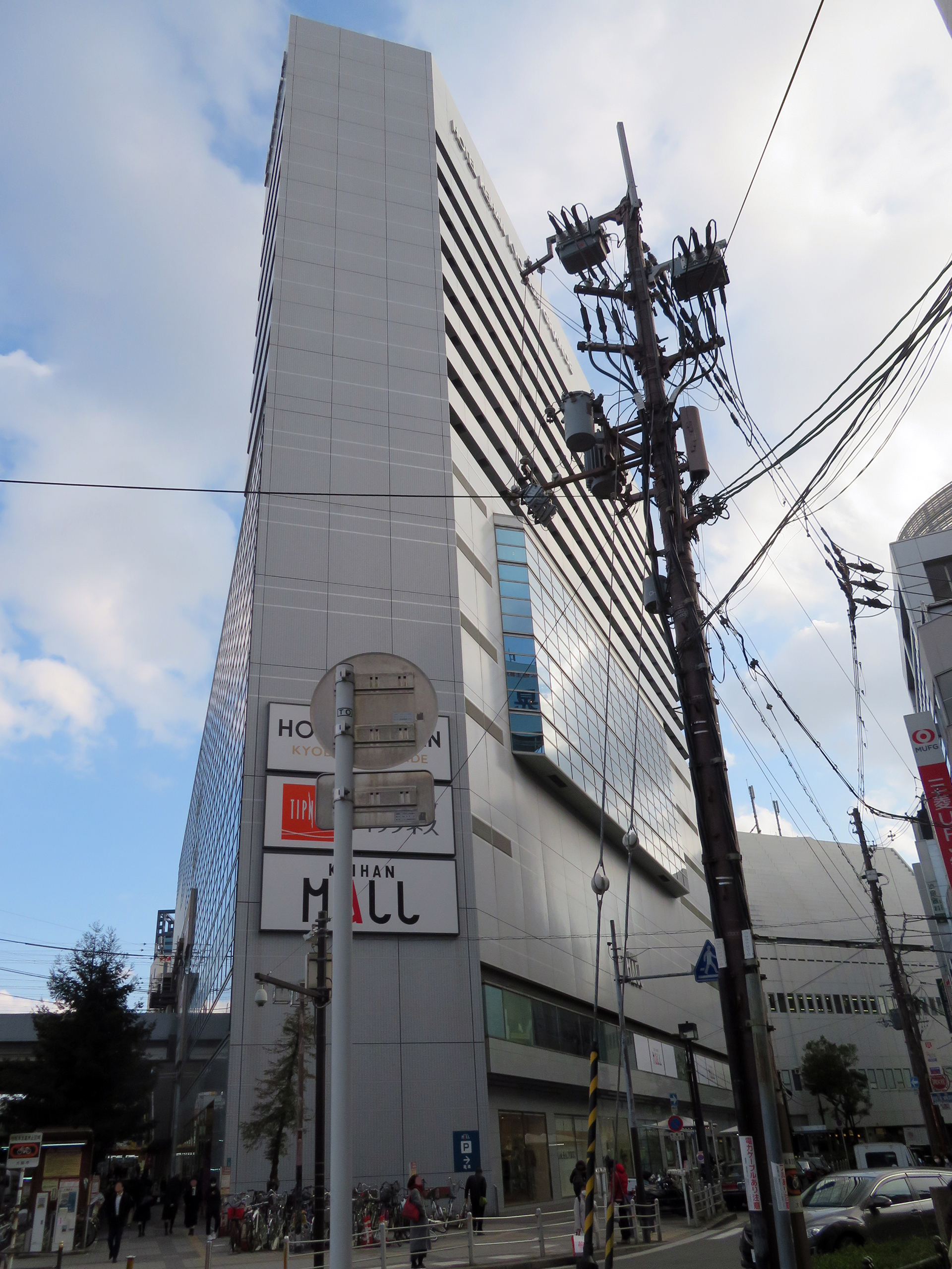 京阪モールを撮影。